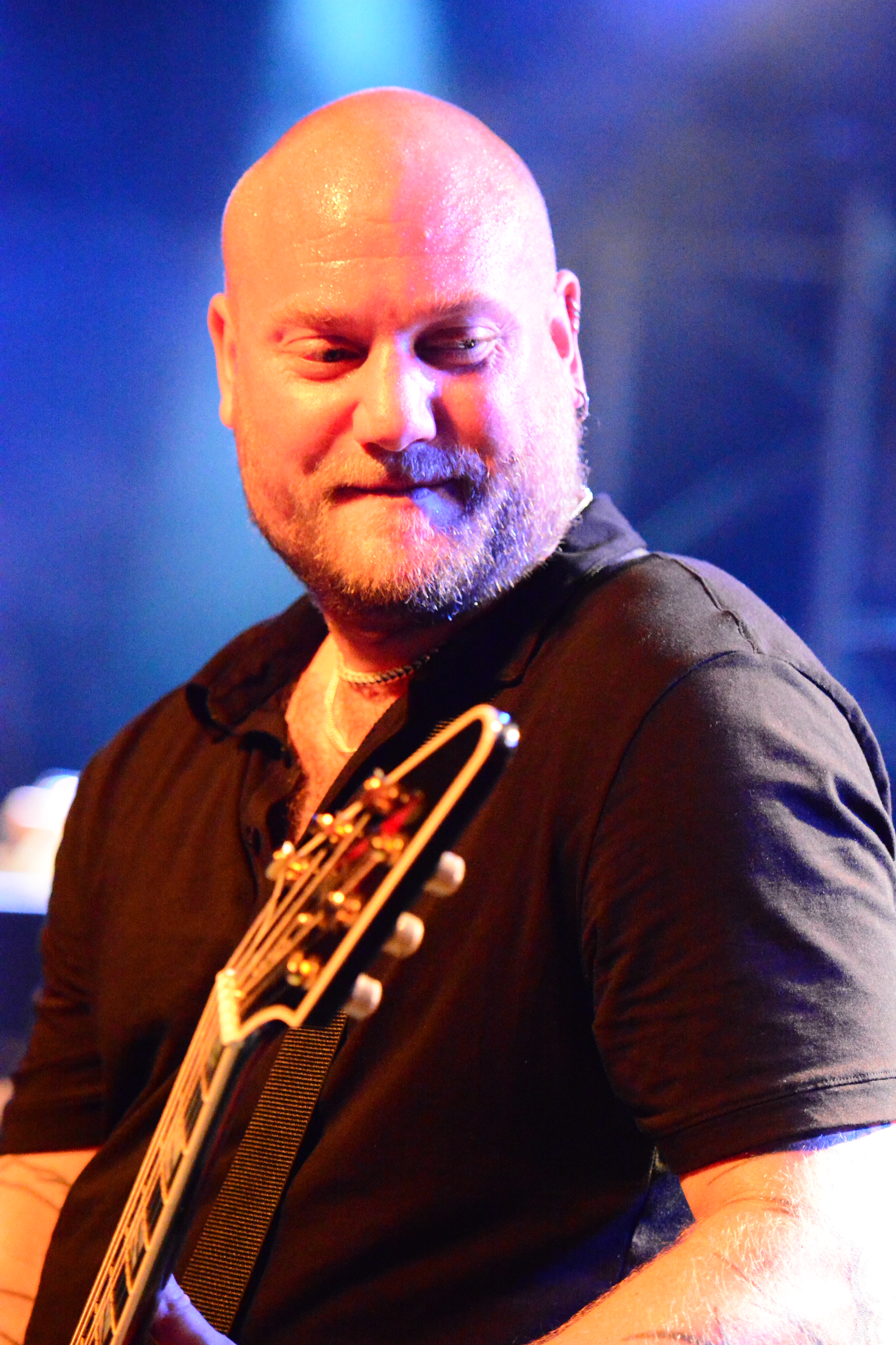 Martin Henriksson von Dark Tranquillity bei den Hamburg Metal Dayz 2014